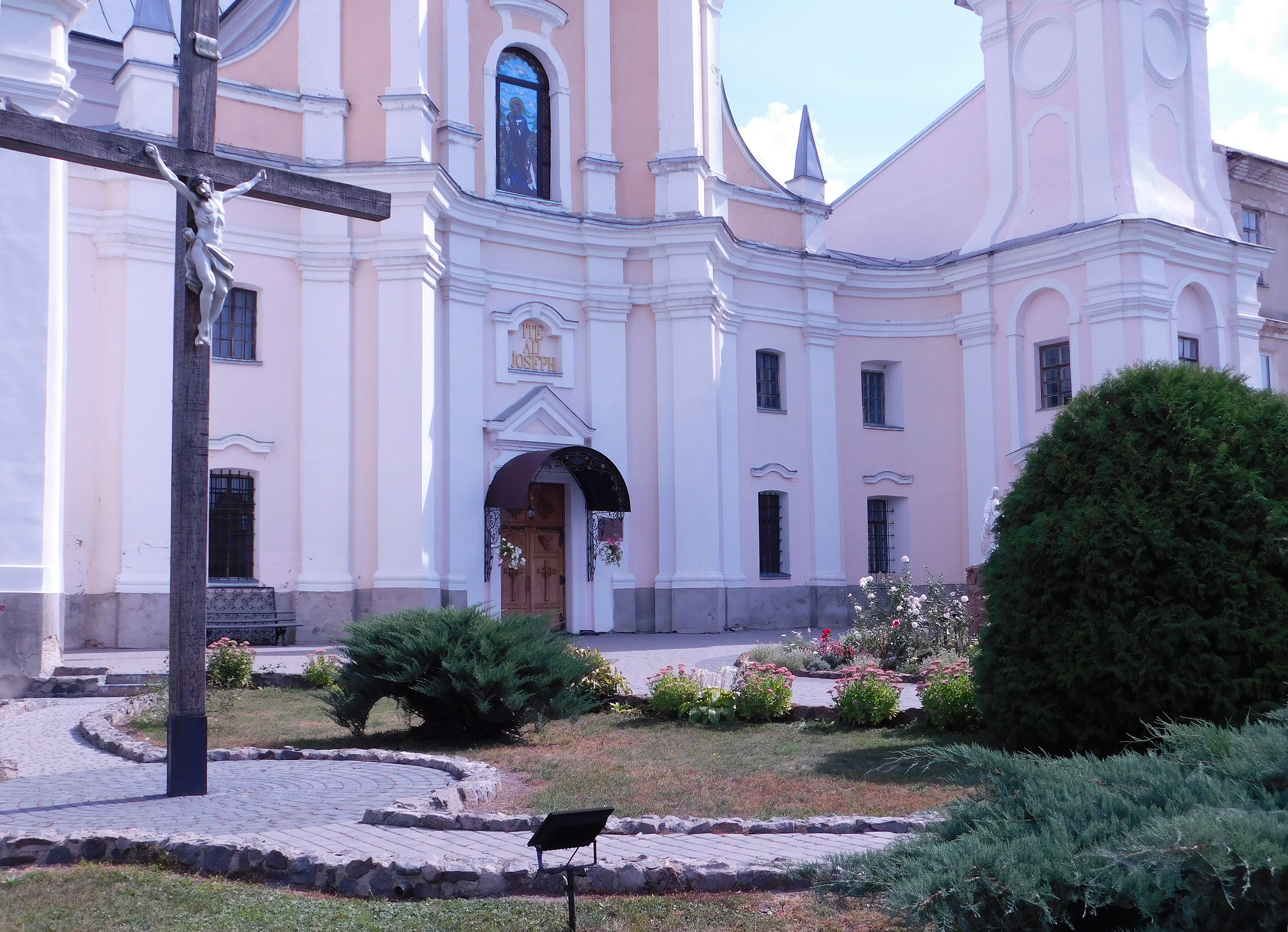 Костел місіонерів Св.Йосифа (мур.), Ізяслав, вул. Шевченка